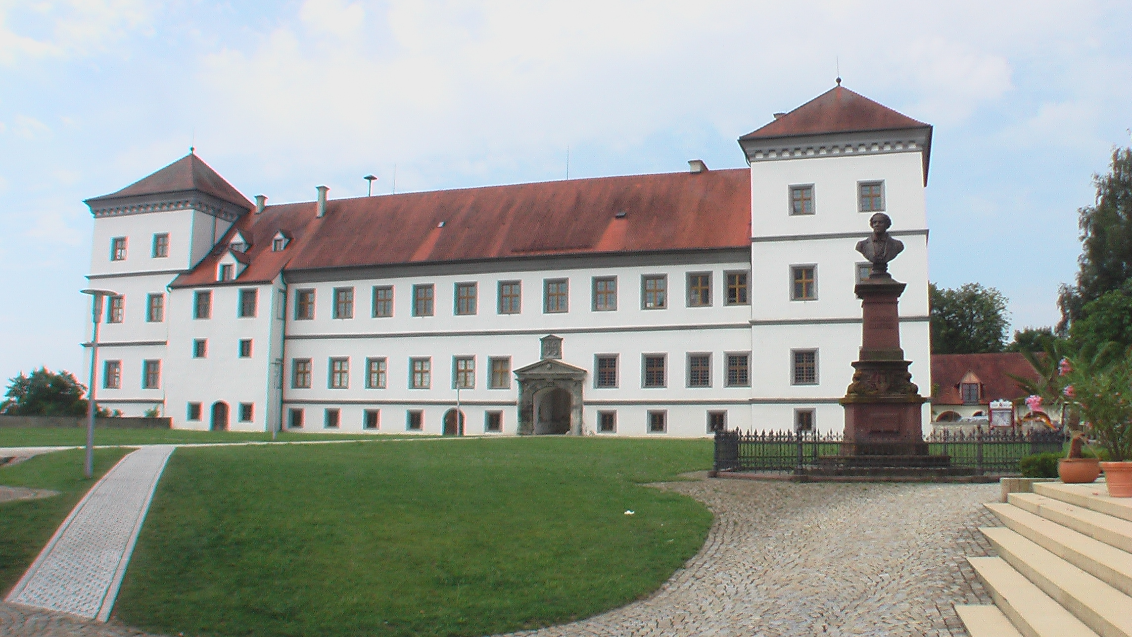 MeßkirchAnsicht2010-1